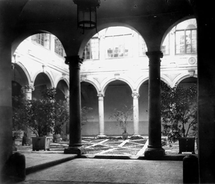 Palacio Arzobispal - Valladolid - Patio - Cristales estereoscópicos 130 x 60 B/N